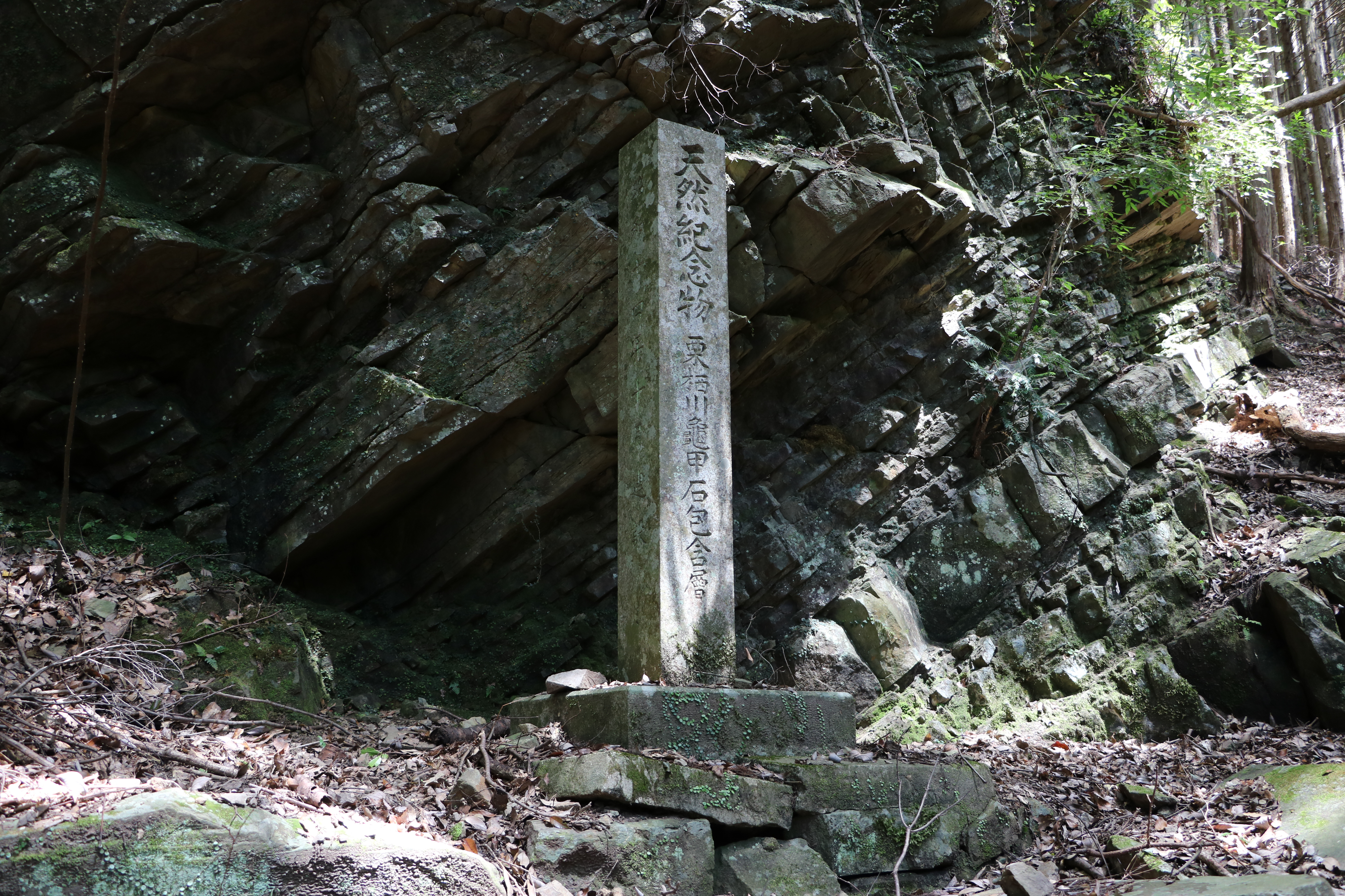 栗栖川亀甲石包含層（国指定天然記念物、和歌山県田辺市）天然記念物石碑。